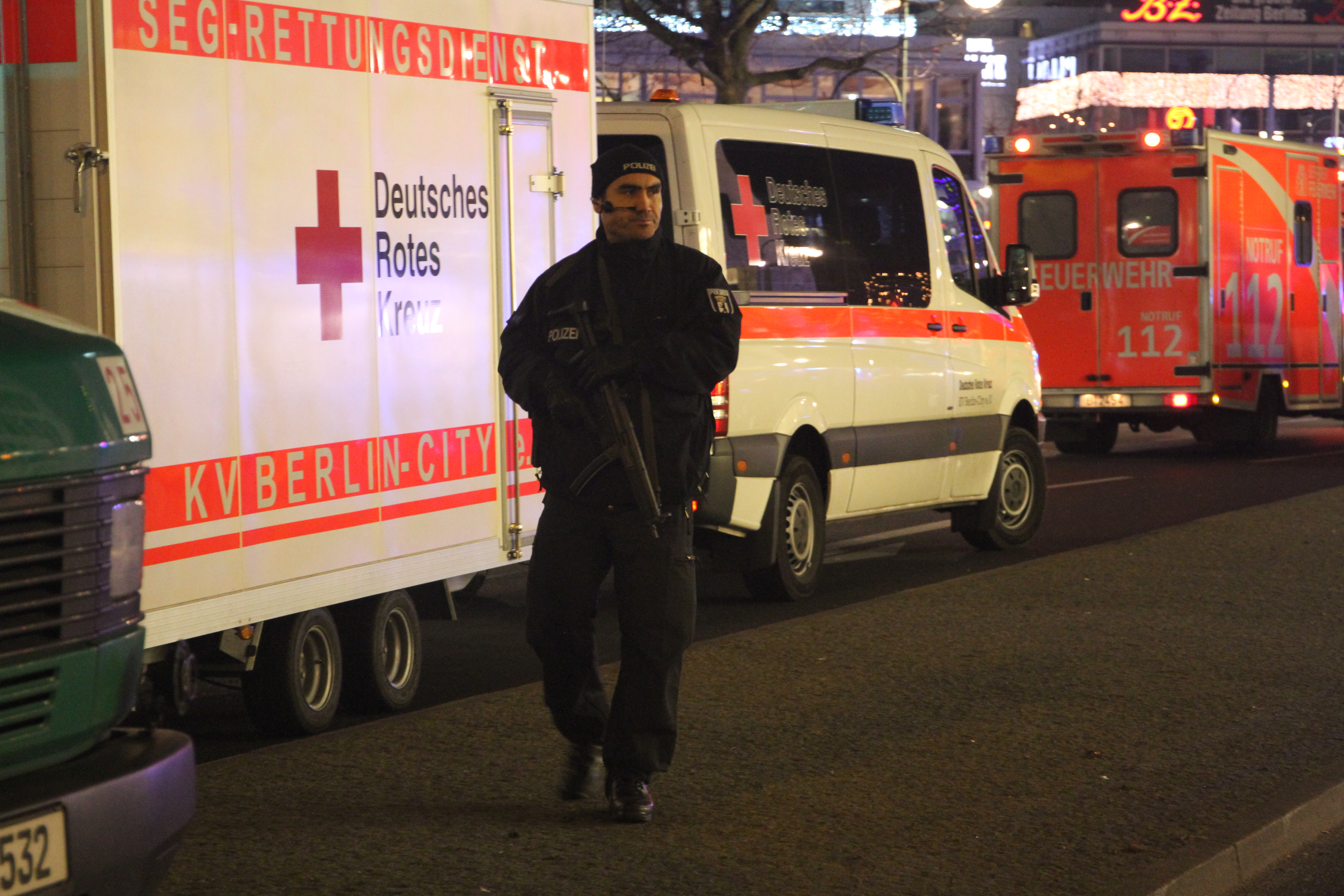 Möglicher Terroranschlag Berlin ( Fotos: Andreas Trojak) am Montag, 19.12.2016 Am Weihnachtsmarkt bei der Gedächtniskirche. LKW rast in den Weihnachtsmarkt - 50 Verletzte - 9 Tote : Hier Gespann einer Schnelleinsatzgruppe des DRK